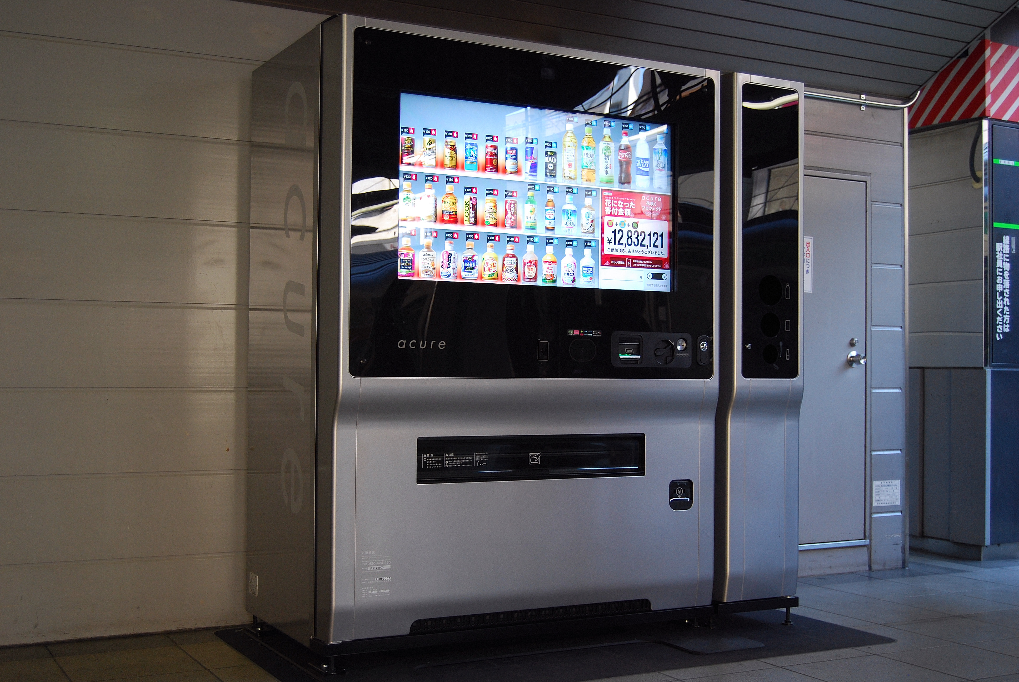 液晶式タッチパネルの自動販売機。